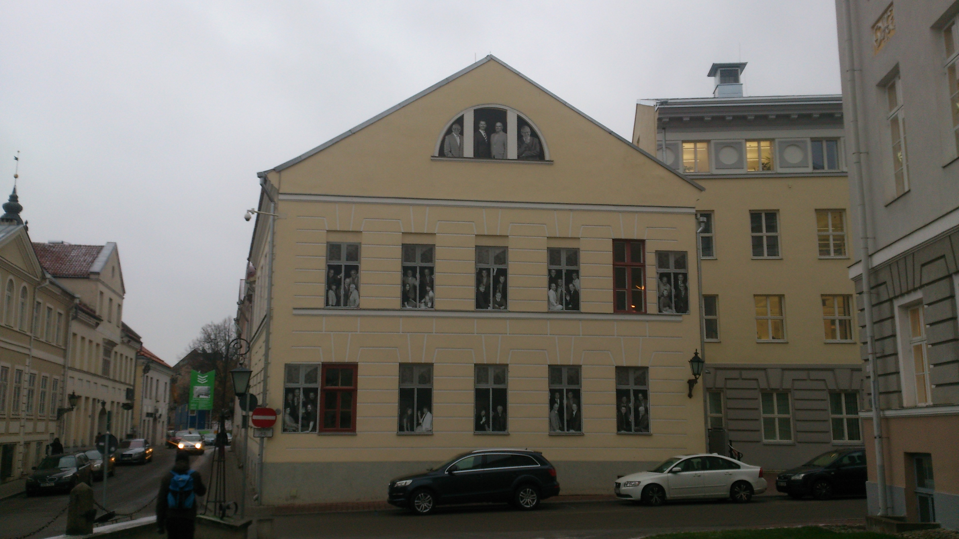 Tartu Ülikooli fotonäitus "Ülikooli näod" õppejõududest ja teadlastest von Bocki maja peahoone-poolsel seinal Jakobi tänaval